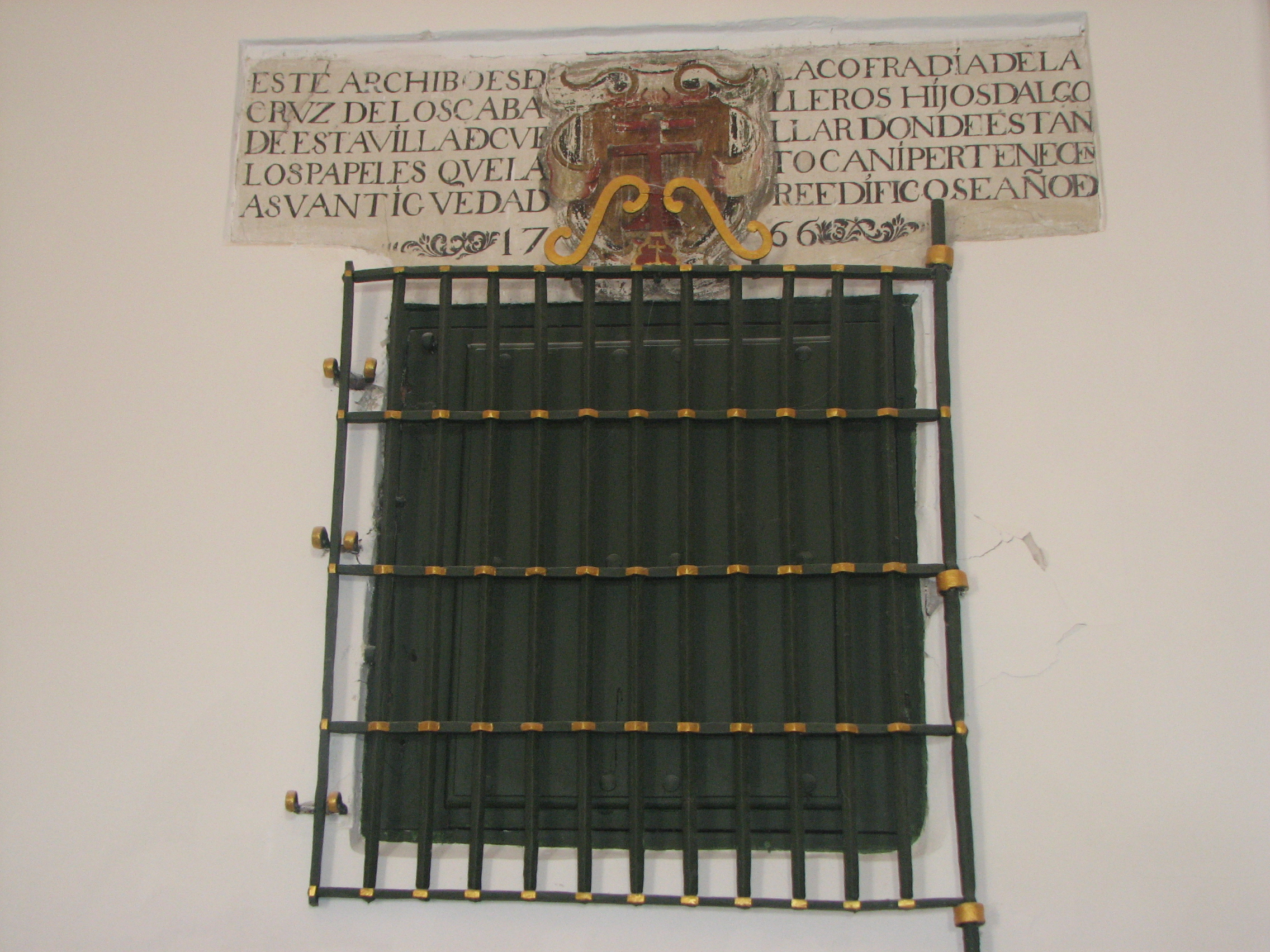 Detalle de la inscripción del archivo de la cofradía de la Cruz de los Caballeros Hijosdalgo de Cuéllar, con sede en la iglesia de San Esteban.